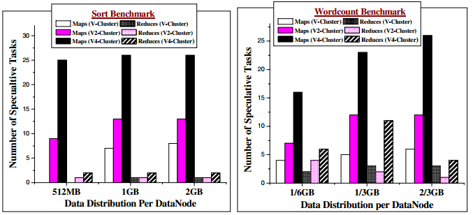 Cluster physique vs cluster machine virtuelle